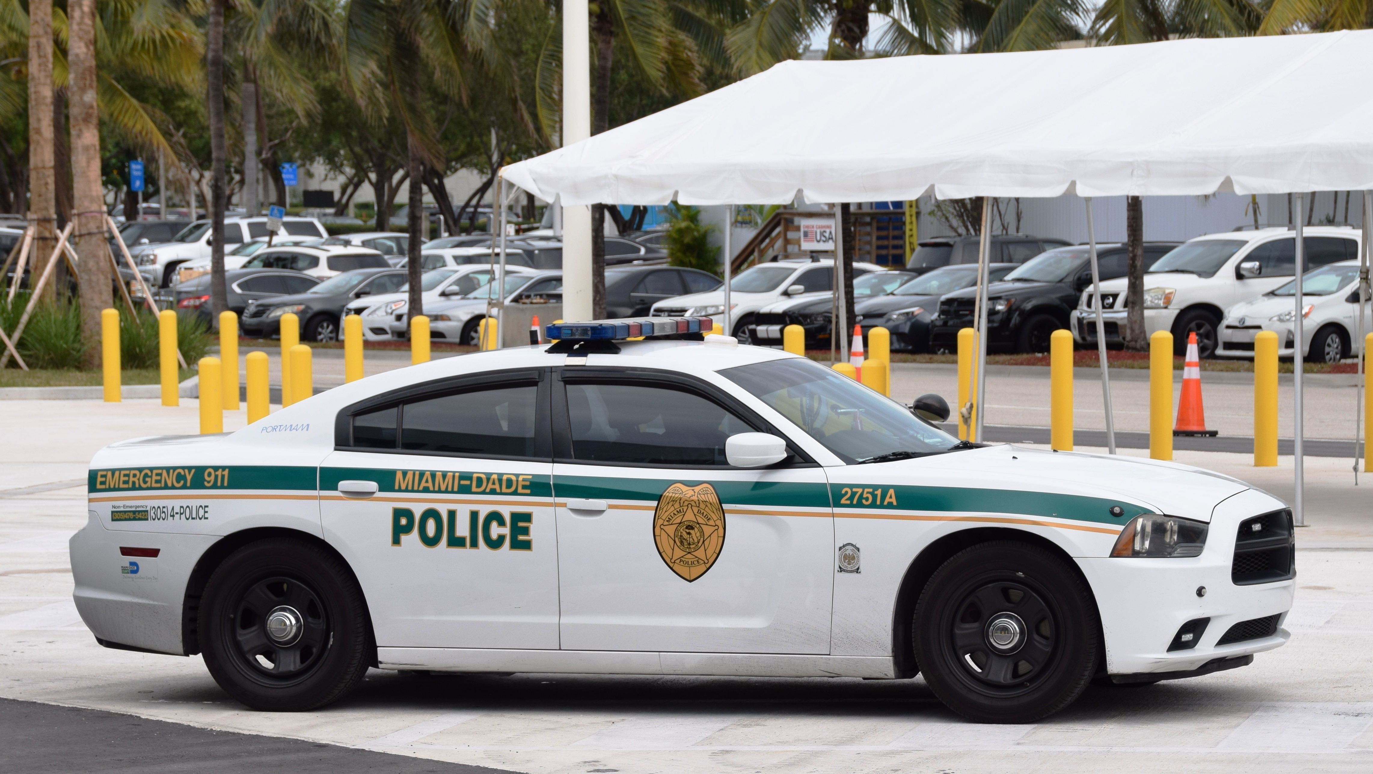 Miami - Dade police auto